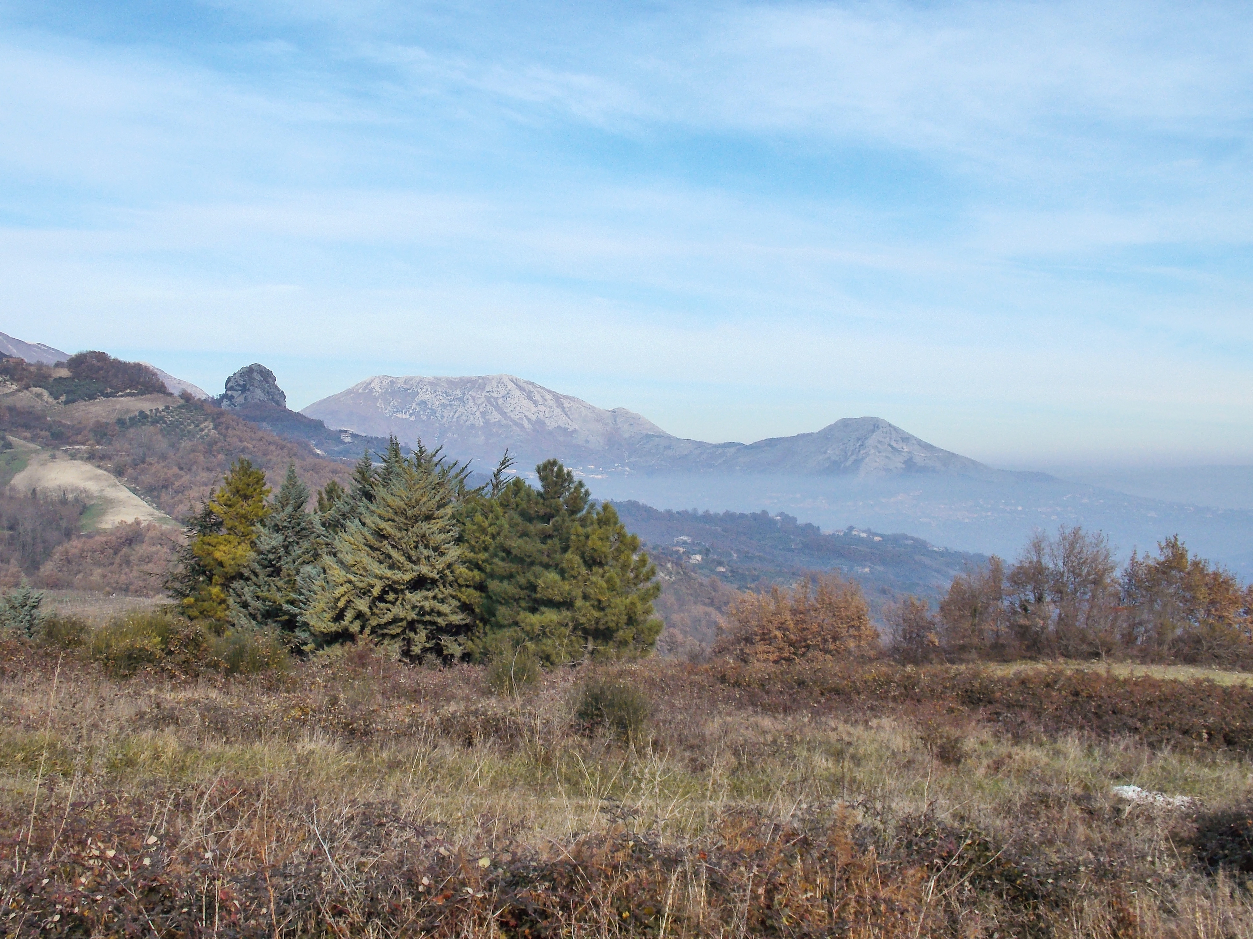 Il monte Pentime e il monte Caruso visti dalla contrada Grieci di Campoli del Monte Taburno (BN). A sinistra è lo sperone calcareo isolato detto "Pietra di Tocco"